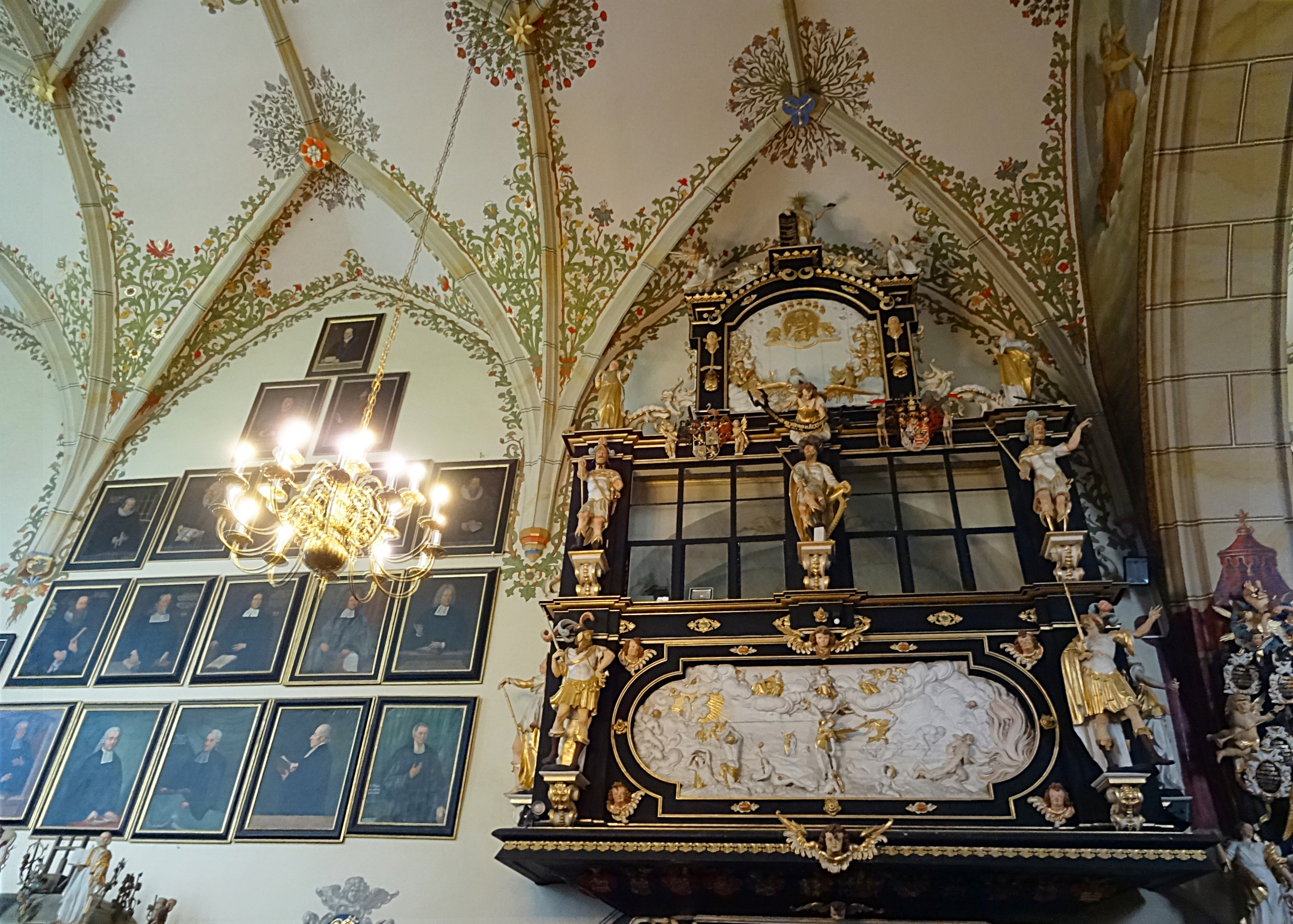 Fürstenstand (fürstliche Betstube) in der Bergkirche Sankt Marien (Schleiz)